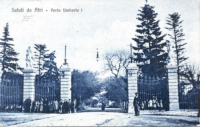 Porta Umberto I (1878), accesso alla città di Atri da est, prima della distruzione nel 1944.